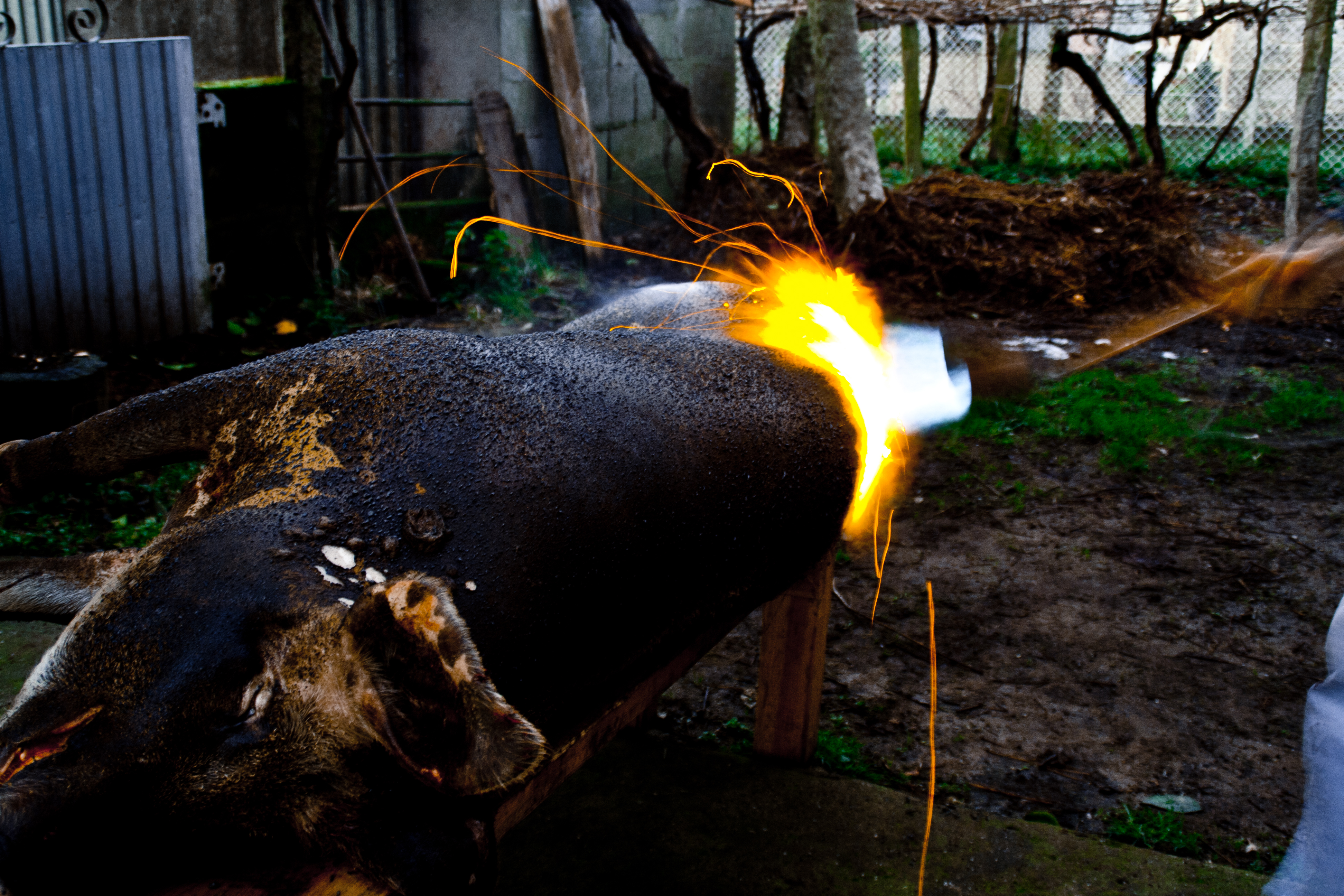 A matanza do porco